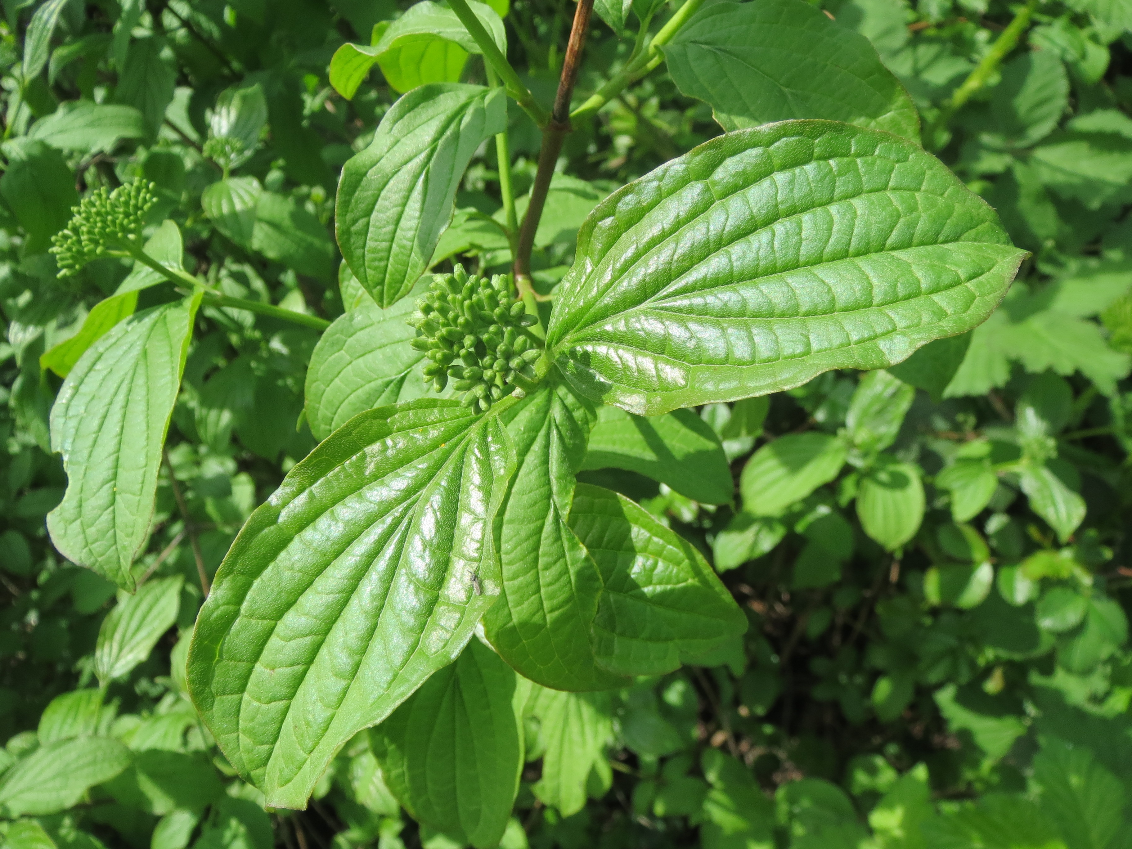 Hartriegel (Cornus sanguinea) im Landesgartenschaupark Hockenheim